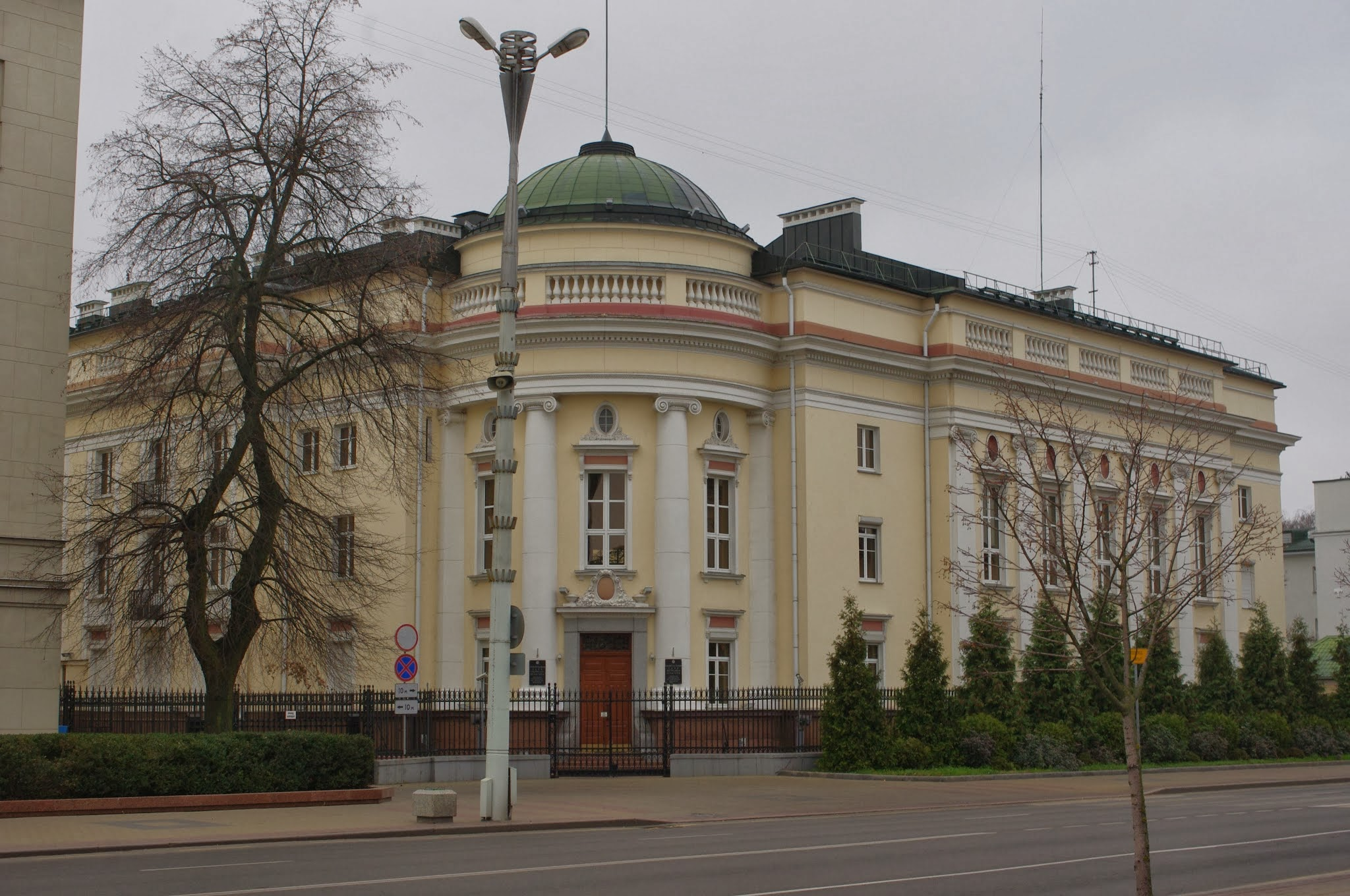 Lieninski rajon, Brest, Belarus